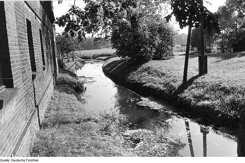 Original image description from the Deutsche Fotothek Rietschen-Neuhammer. Ehem. Hammermühle, Neugraben